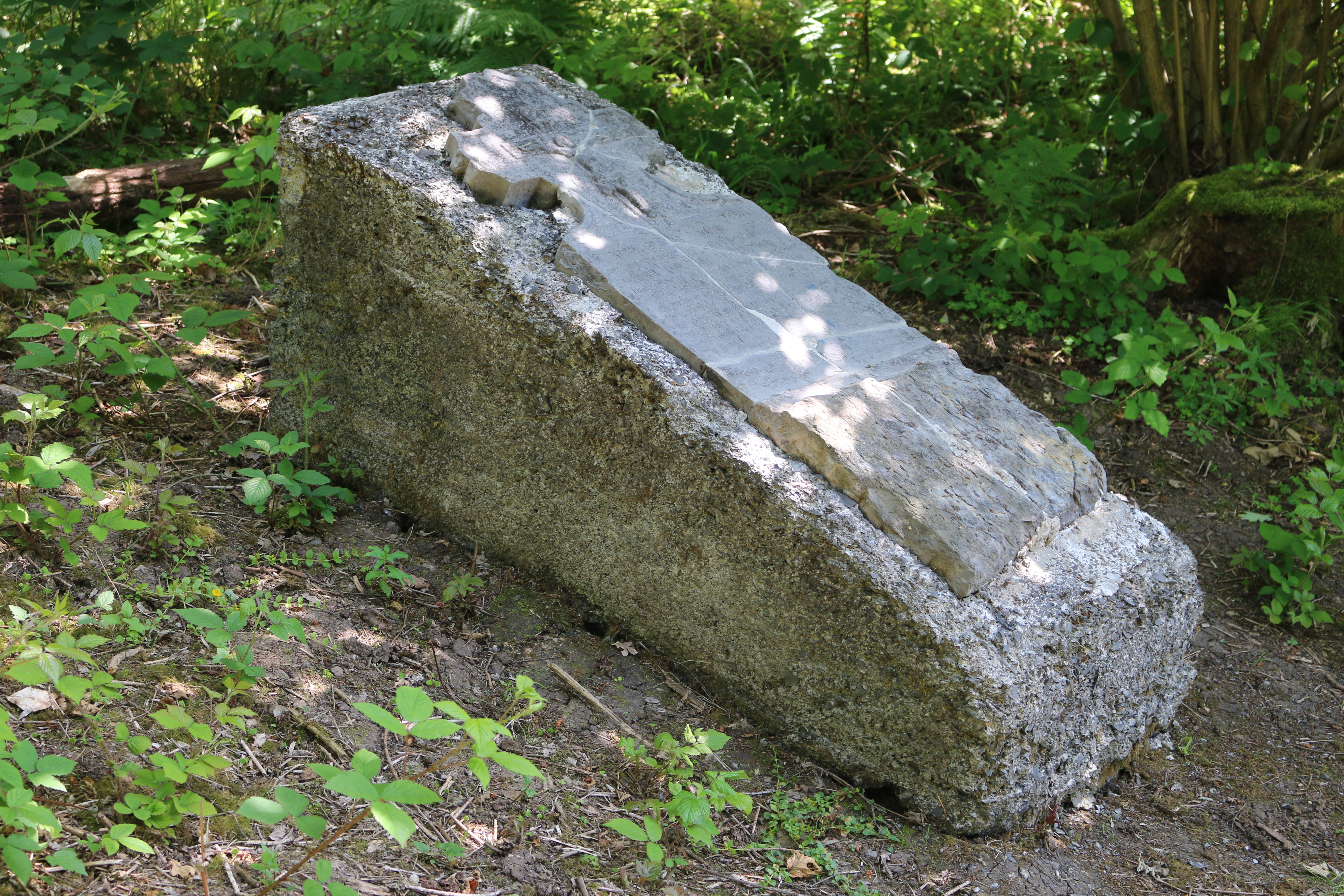 Lahr, Westerwald: Mordkreuz für den Bauern Wilhelm Keyl, der während des Siebenjährigen Krieg 1759 erschossen wurde